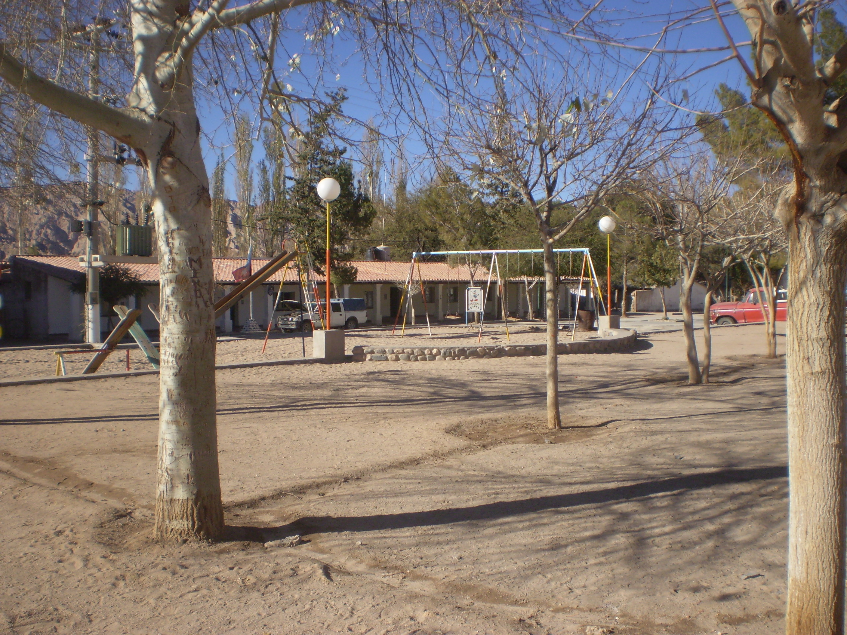 Angastaco (Salta)plaza central.